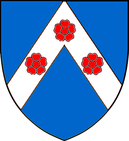 Vapensköld för dansk adelsätten Rosensparre